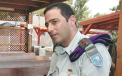 אלם גדי אגמון.